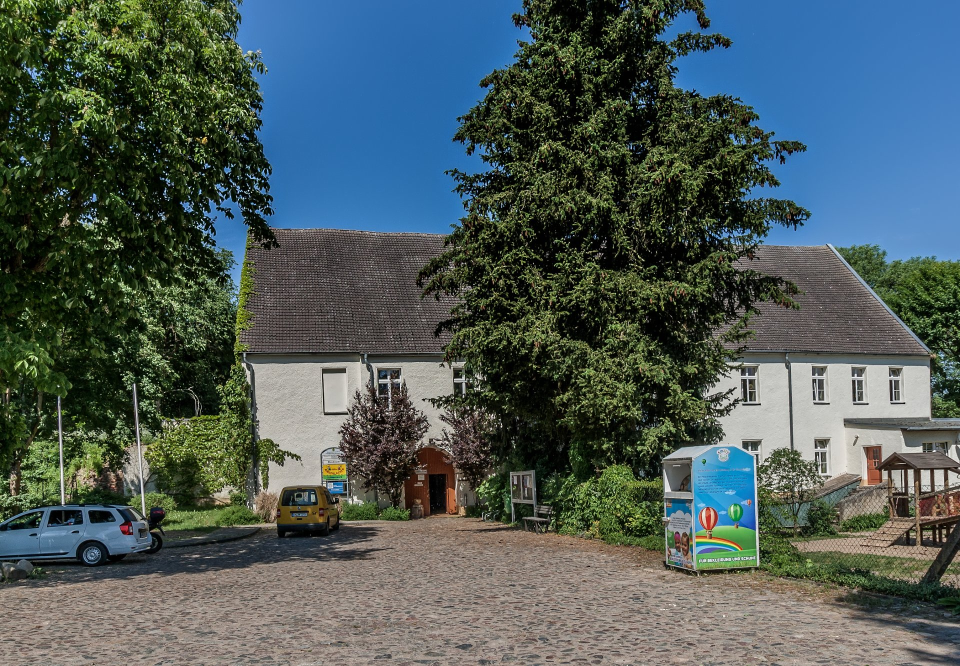 Westflügel des Schlosses. Hier befindet sich heute der Gemeindesitz und eine Kindertagesstätte.